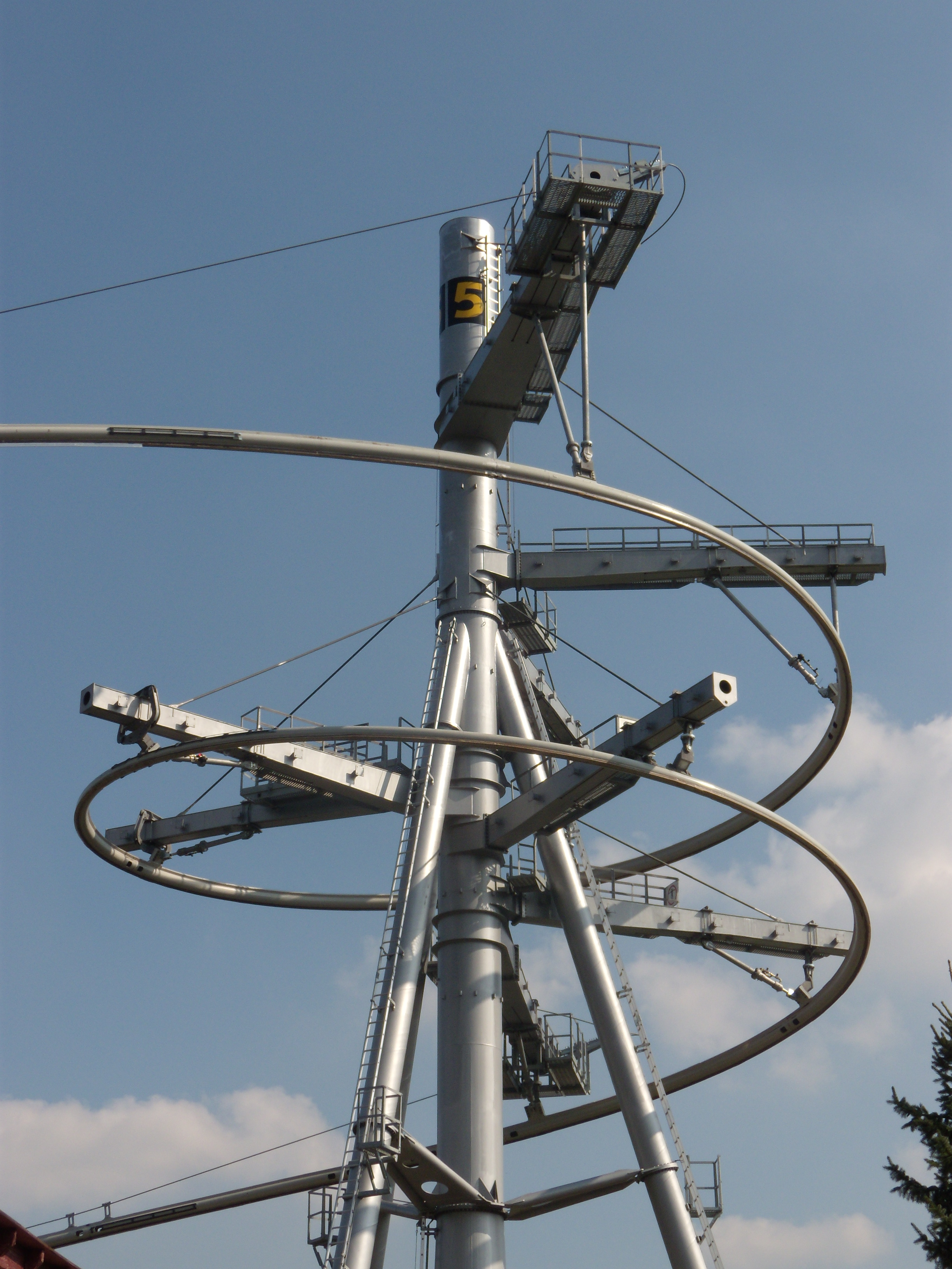 Hélice de Vertigo, Mountain Glider à Walibi Belgium.